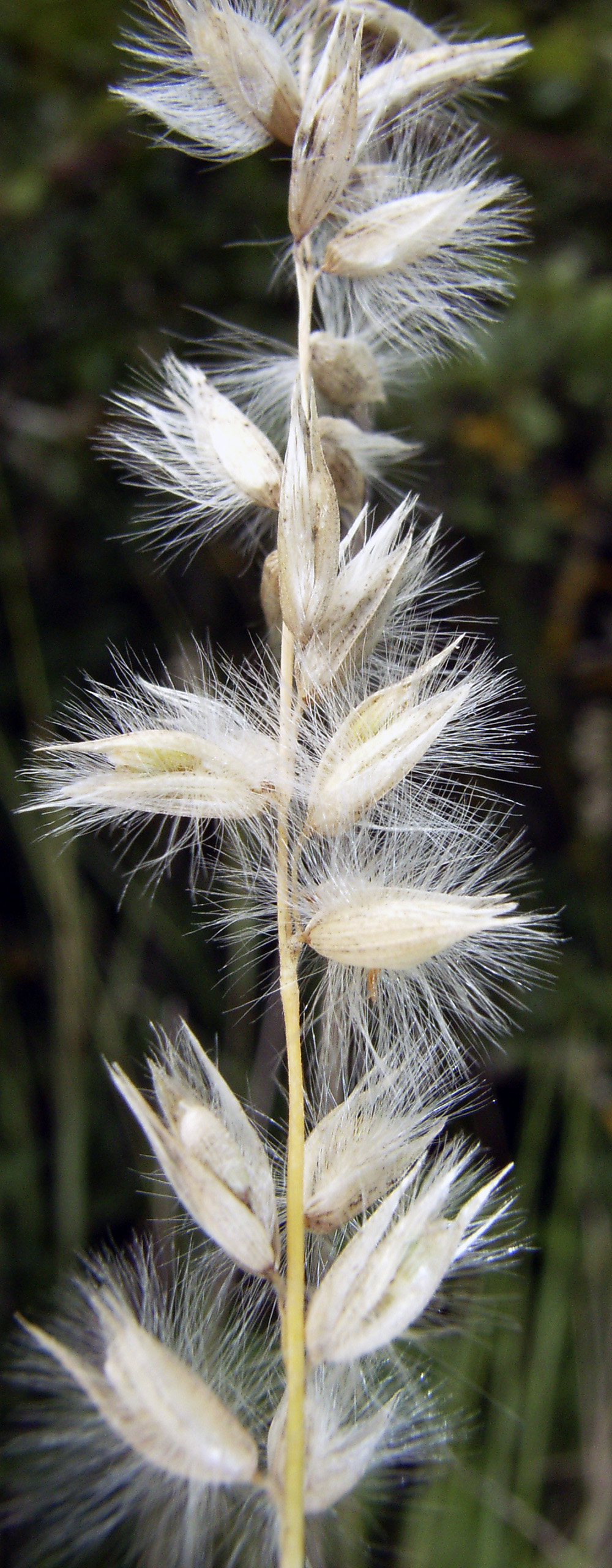 Melica ciliata; Bad Kissingen